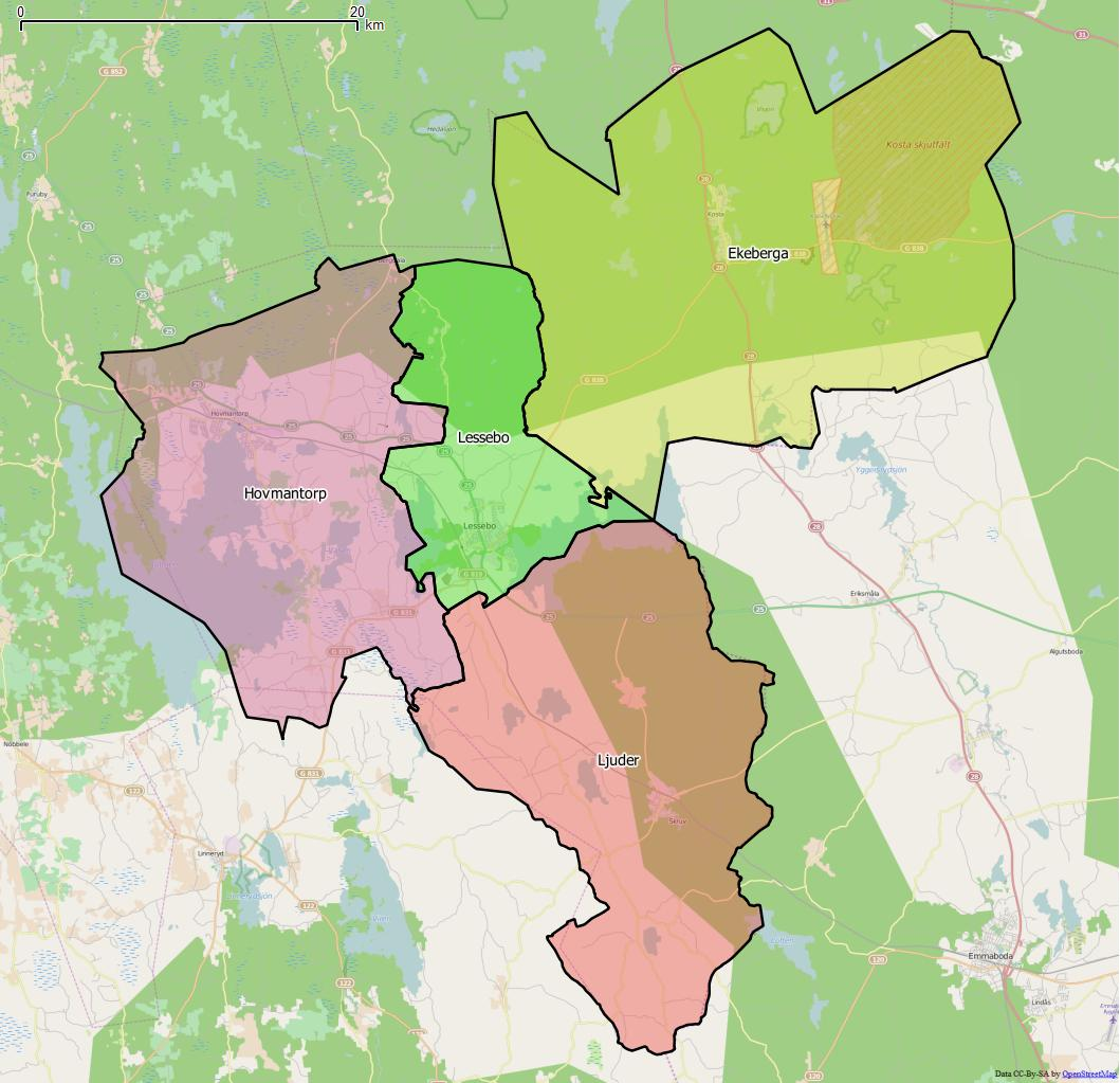 Distriktsindelningen i Lessebo kommun World file: 62.77523720878579638 0 0 -62.77523720878579638 1671180.28997062821872532 7741655.53926777187734842